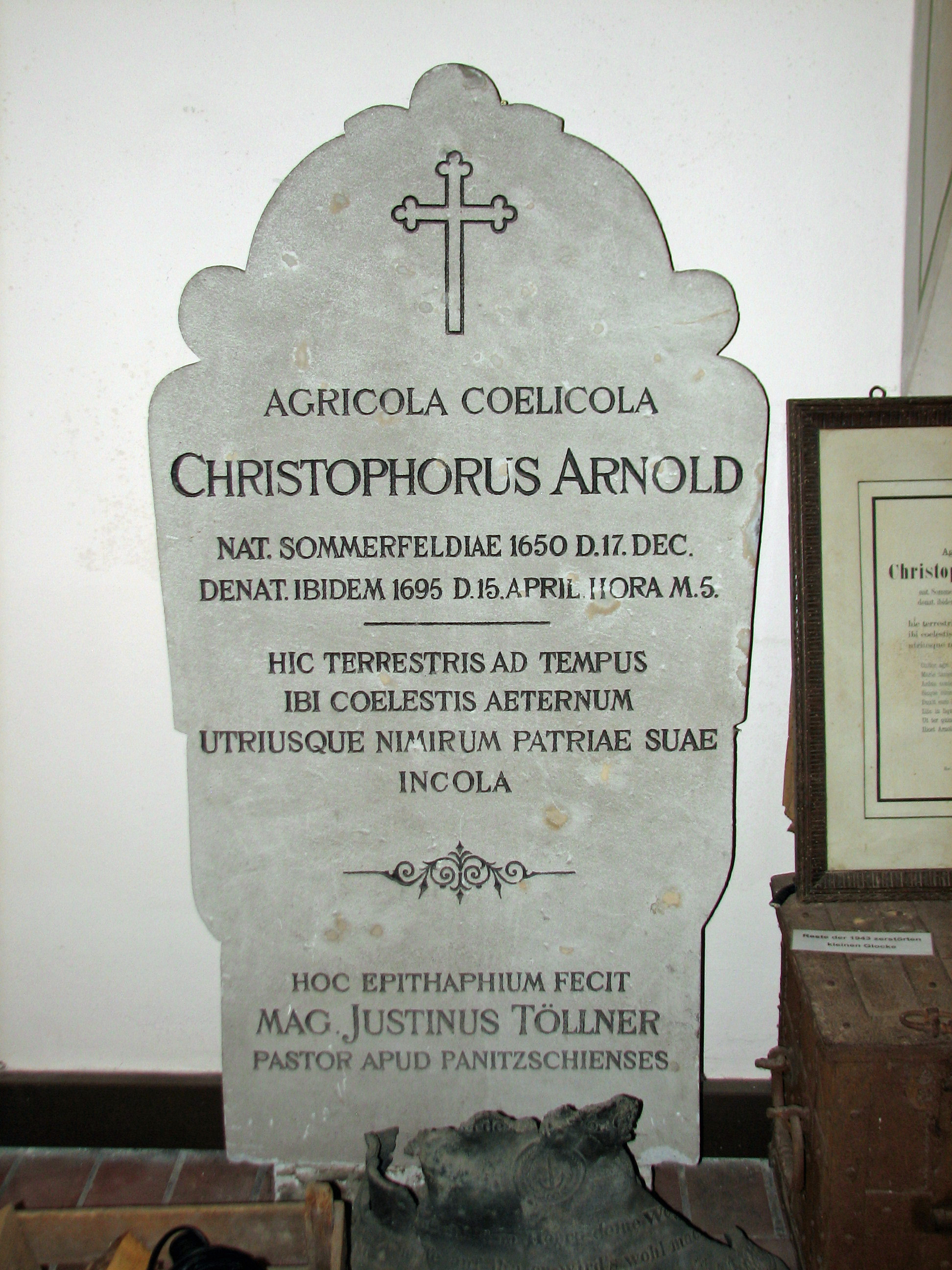 Epitaph für Christoph Arnold in der Kirche Sommerfeld Hier Erdenbürger auf Zeit, Dort Himmelsbewohner in Ewigkeit – Starb er ein Bürger in beiderlei Reich. (Übersetzung des lateinischen Spruchs durch den Verfasser Justinus Töllner)